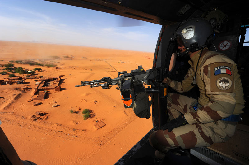 Photo aérienne du fort de Madama - Niger, novembre 2014